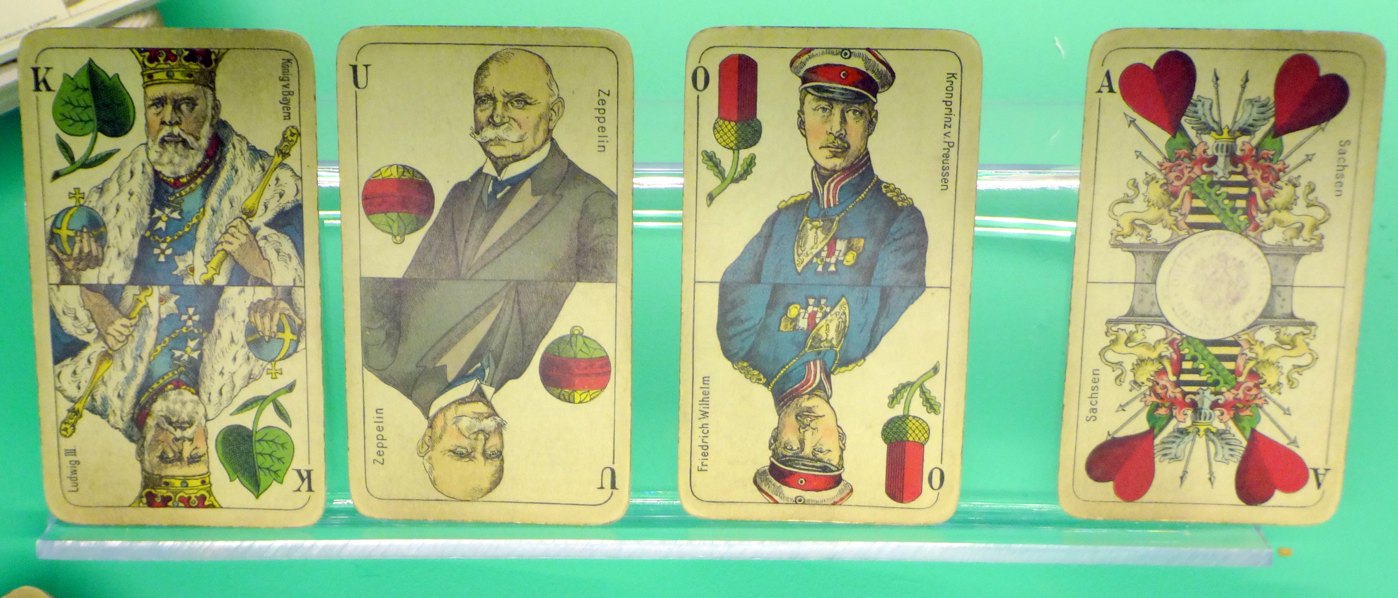 Duits propagandaspel geïnspireerd op de "Deutsche Kriegsspielkarte".